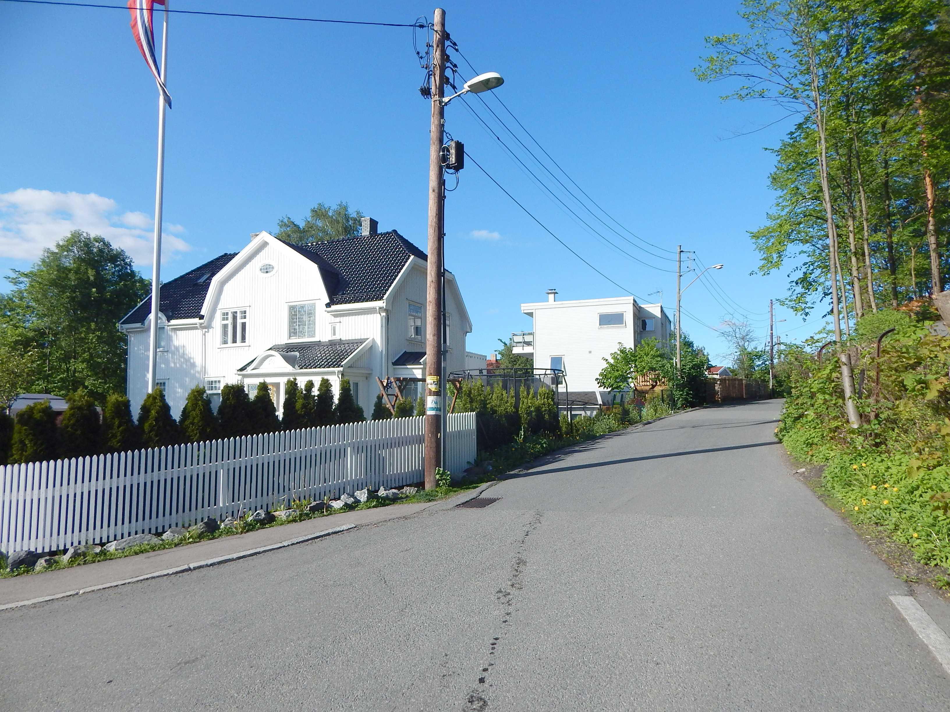 Tingstuveien